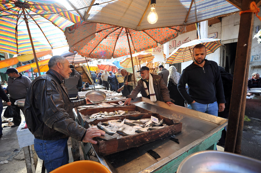 سوق السمك من اشهر معالم مدينة بورسعيد الساحليه This is an image of food from Egypt